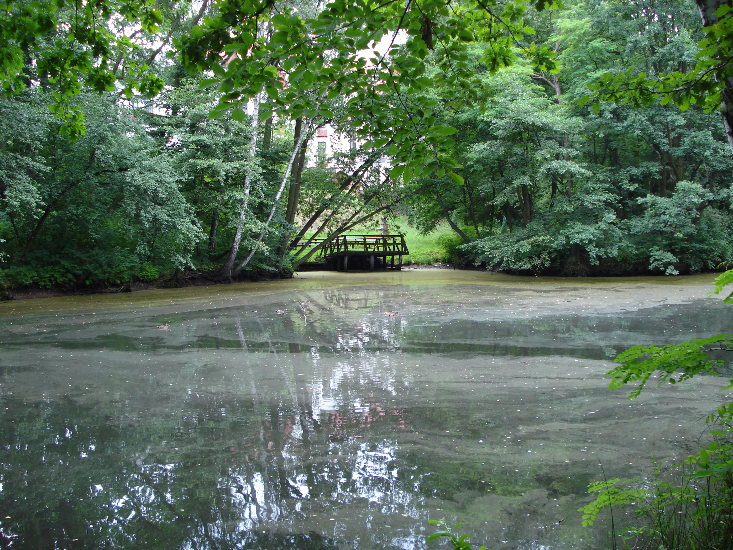 Dom pomocy społecznej w Zielonce - ogród